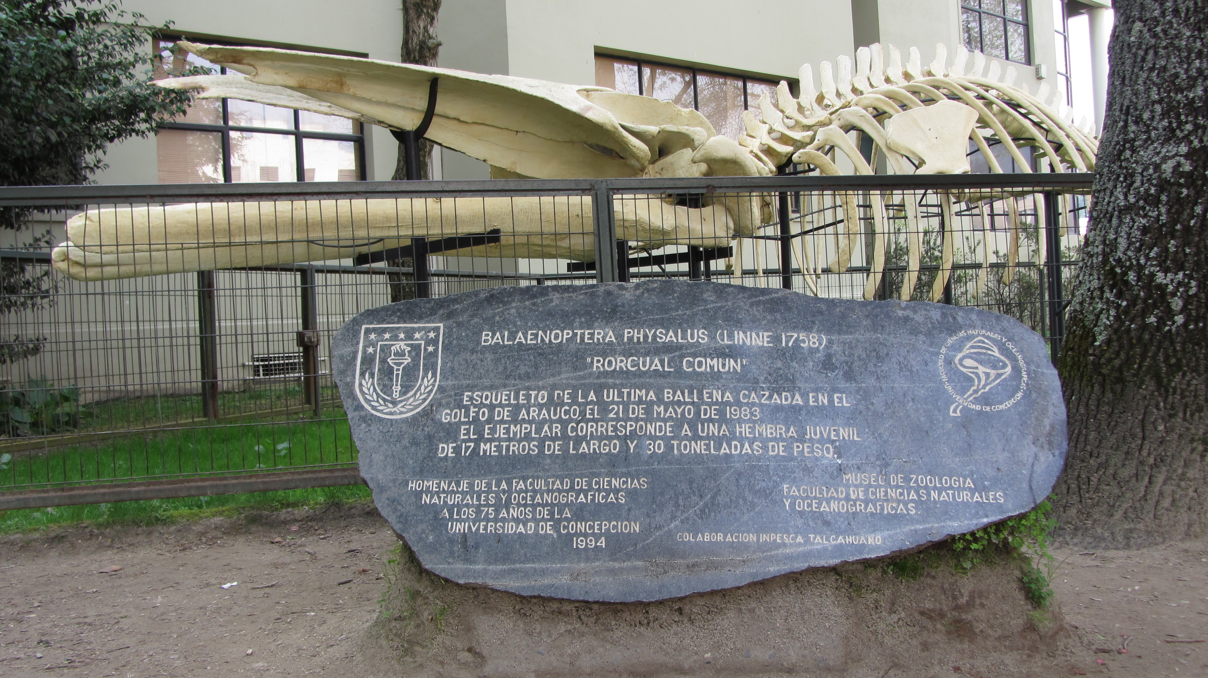 Esqueleto de ballena Facultad de Cs. Naturales y Oceanográficas de la Universidad de Concepción Concepción, Chile 2012